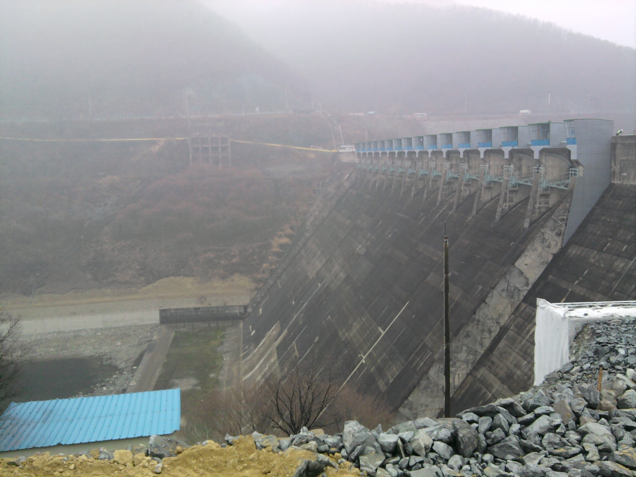 섬진강댐 전면